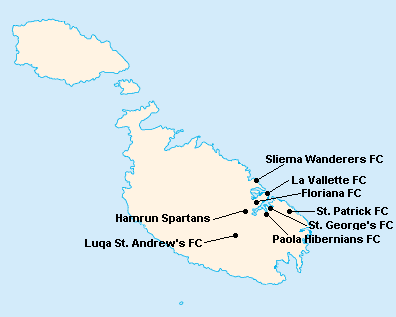 Répartition des clubs en First Division Maltaise 1950-1951.